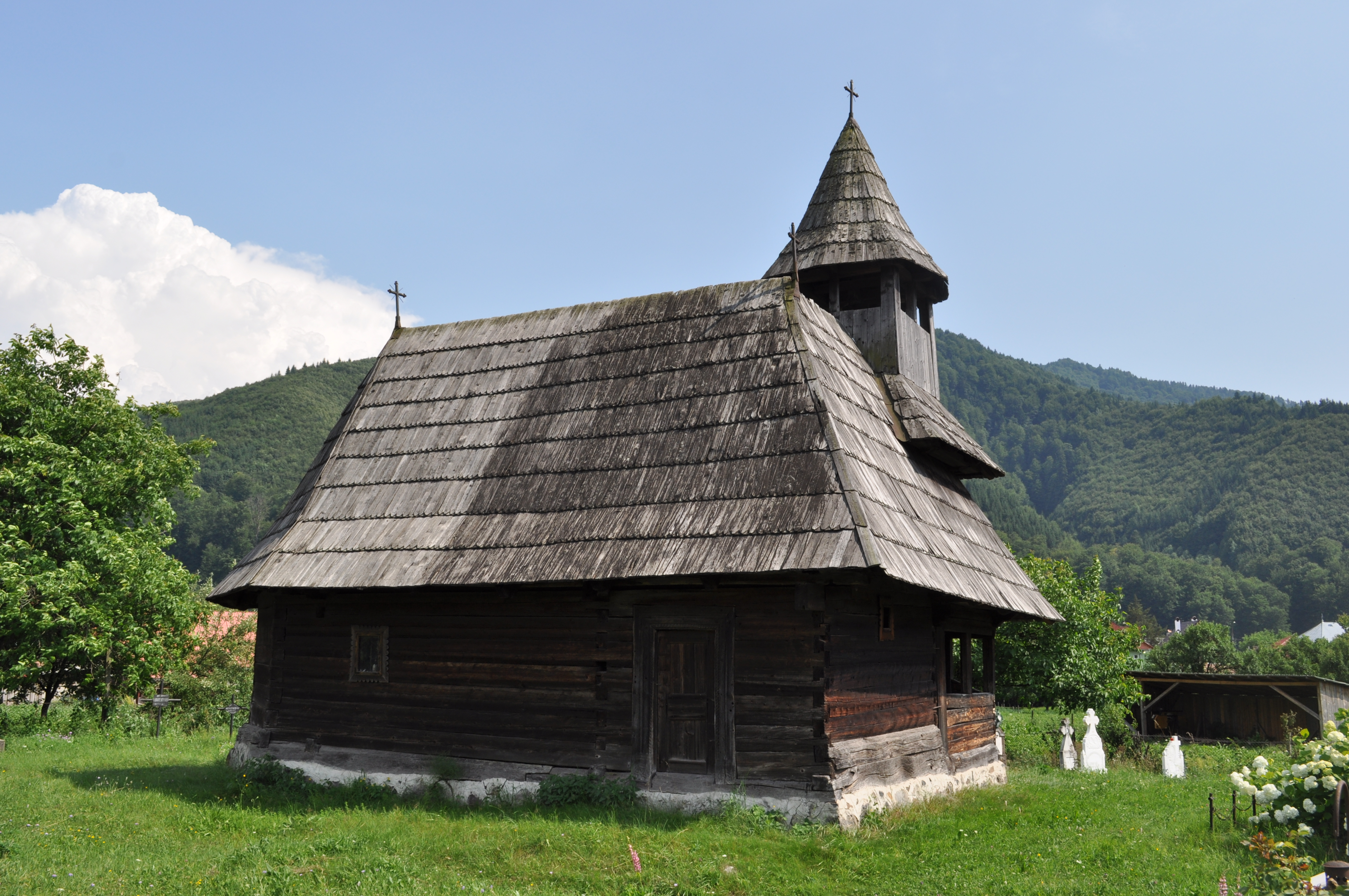 Biserica de lemn „Sfântul Nicolae” din Răstolița, județul Mureș